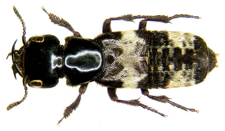 Familie: Staphylinidae Grösse: 15-25 mm Verbreitung: Europa Ökologie: an Aas, häufig Fundort: Germania, Bayern, Oberfranken, Kulmbach leg.det. U.Schmidt, 1979 Foto: U.Schmidt, 2005